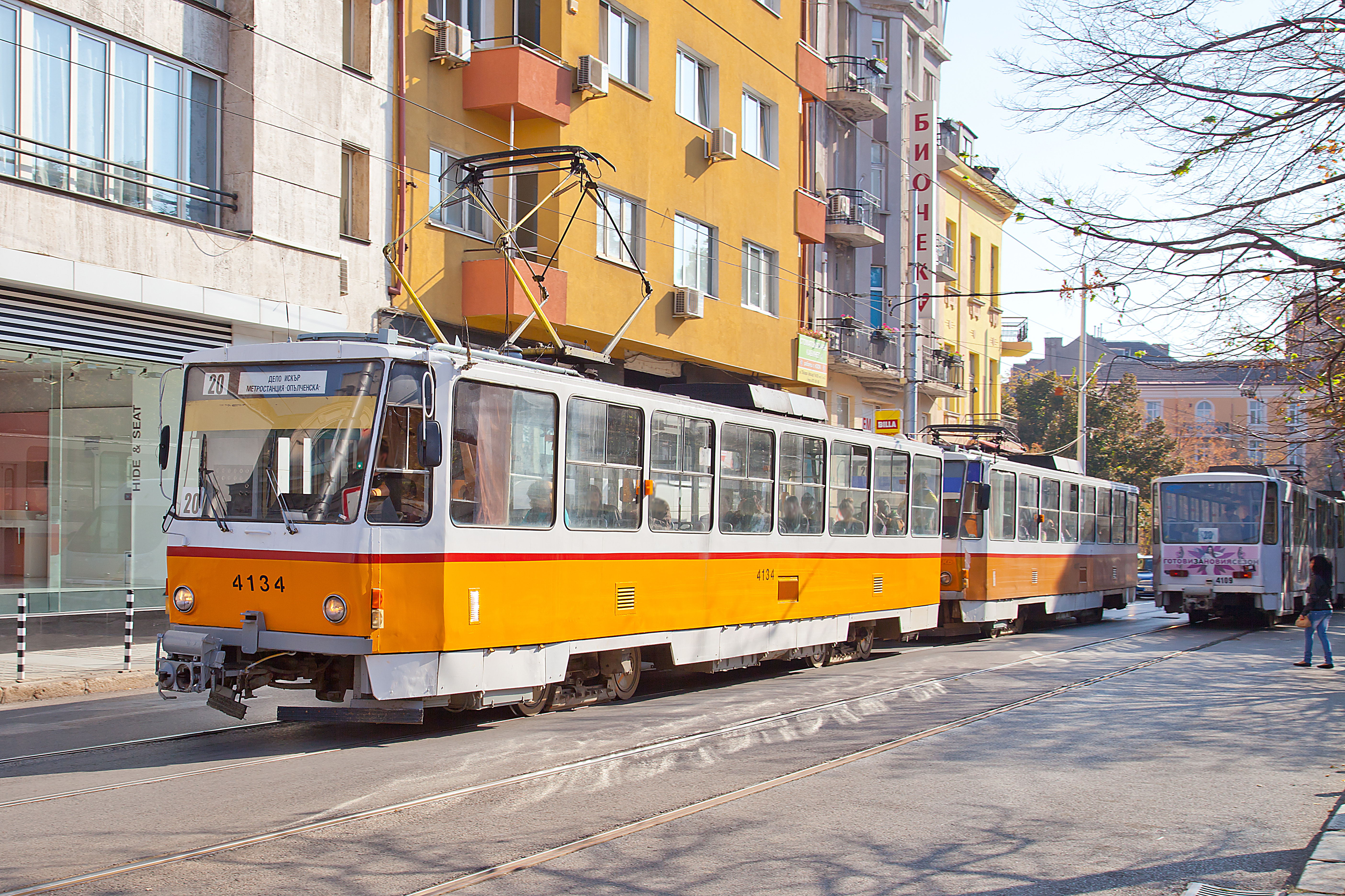 Straßenbahn in Sofia